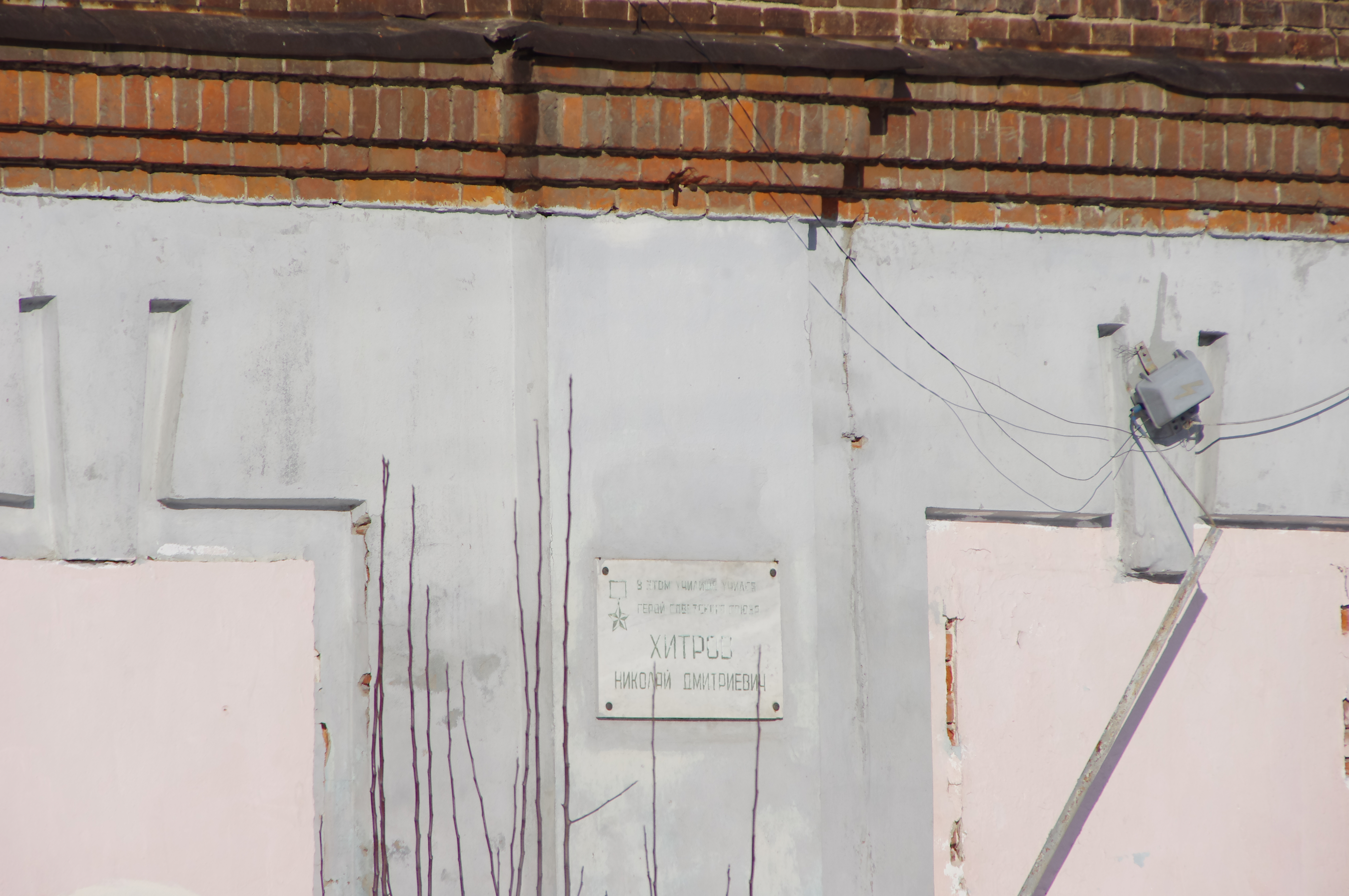 Noginsk, Moscow Oblast, Russia